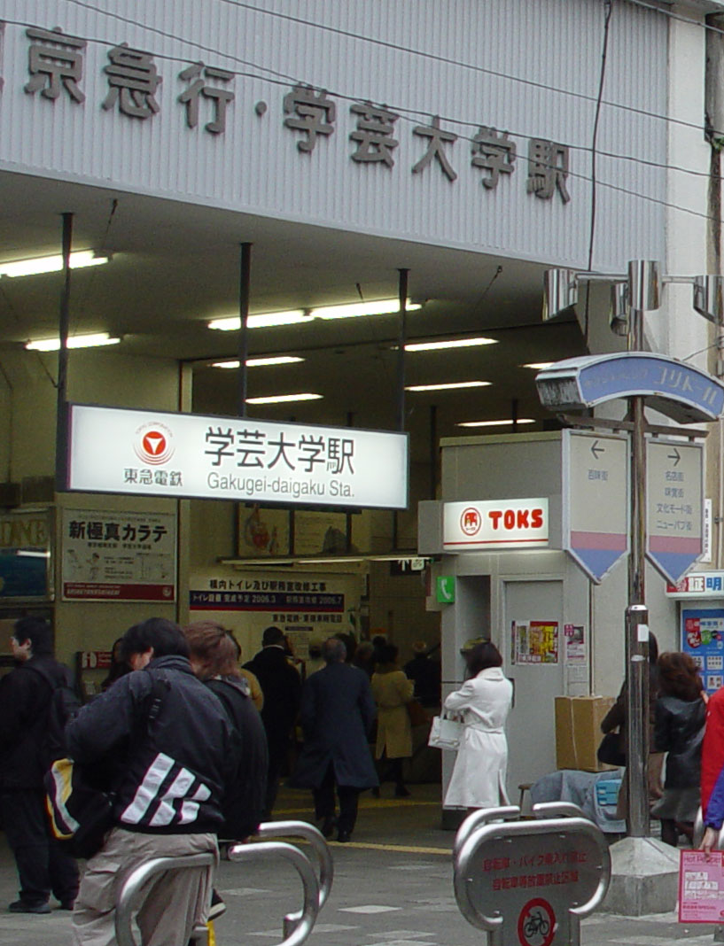 Gakugeidaigaku Station, Tokyo, Japan学芸大学駅